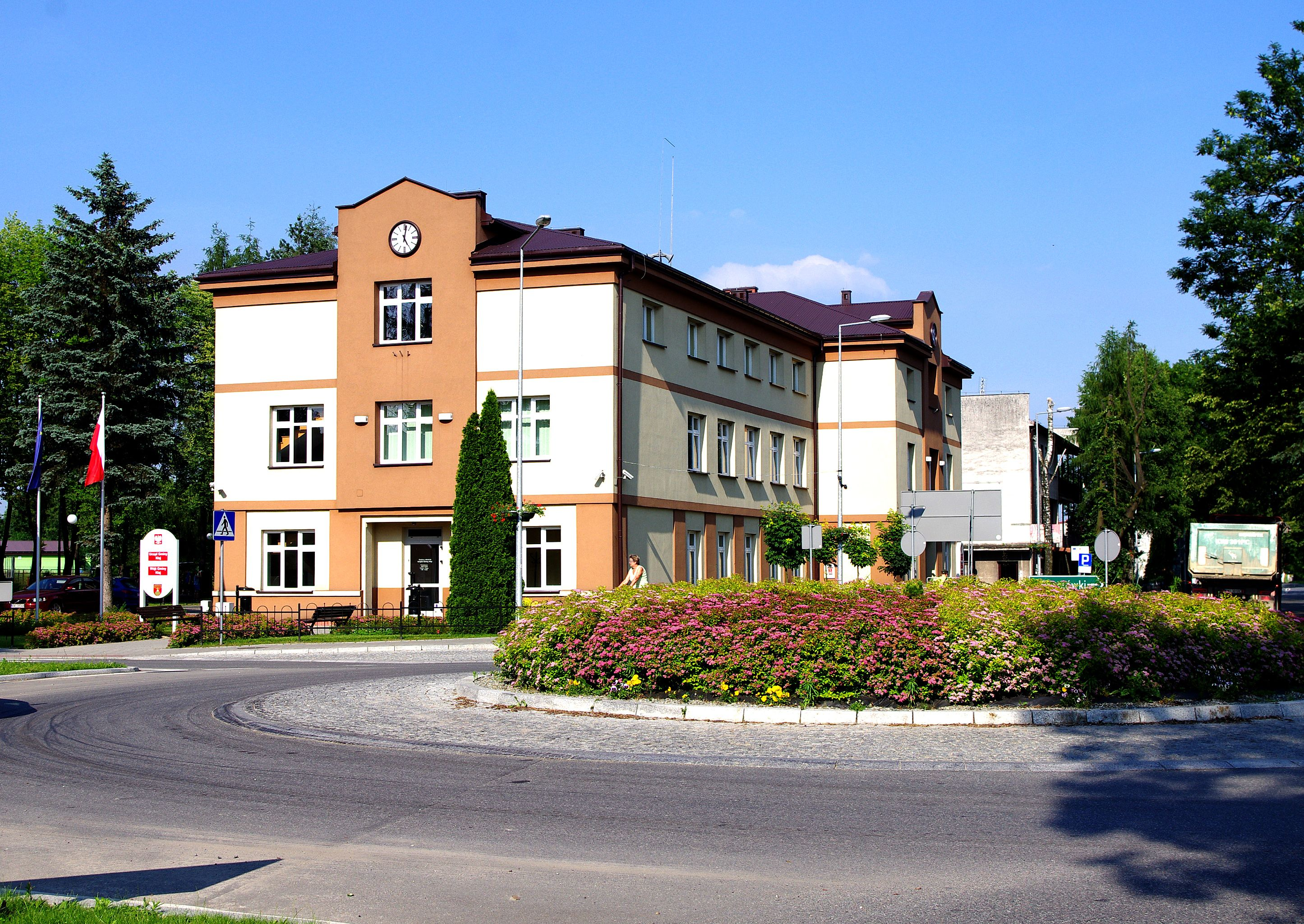 Centrum Gminy Kłaj